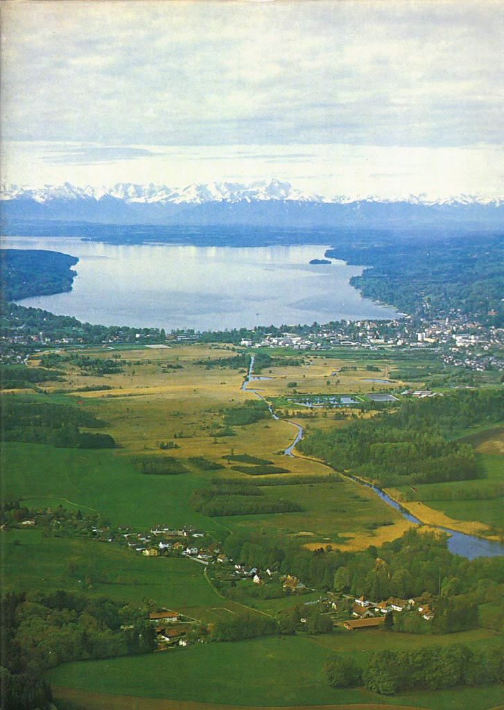 Der Starnberger See, im Vordergrund die abfließende Würm, Blick von Starnberg in Richtung Süden. – Der General-Anzeiger WELT-ATLAS aus dem Jahr 1953 (Georg Westermann, Kartographische Anstalt und Druckerei in Braunschweig) benennt den Würmsee in 1953 schon als Starnberger See.